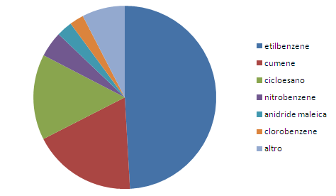 Grafico a torta dei principali derivati del benzene